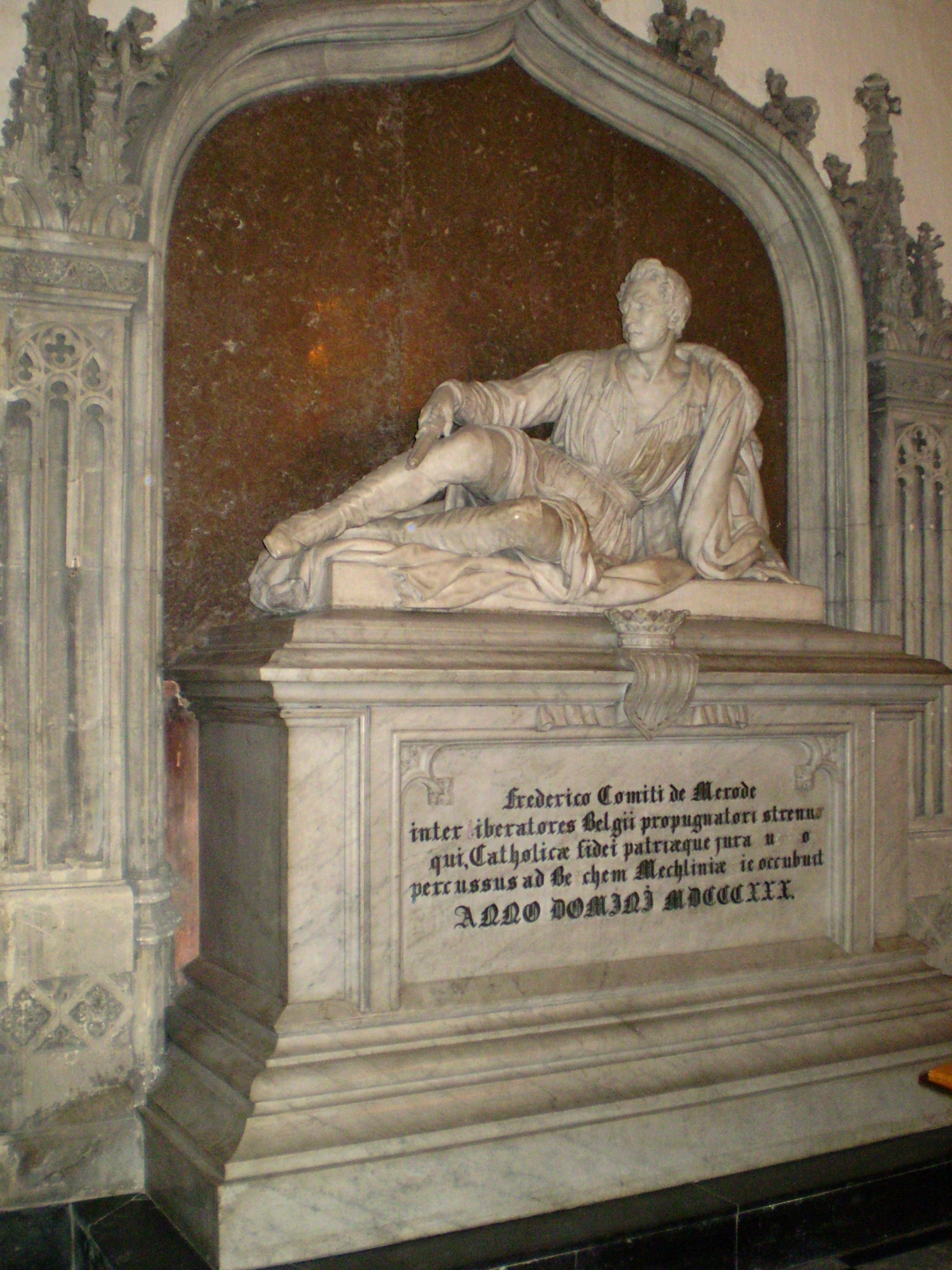 Mausolée Frédéric de Mérode, Cathédrale Saints-Michel-et-Gudule de Bruxelles, sculpteur: Guillaume Geefs